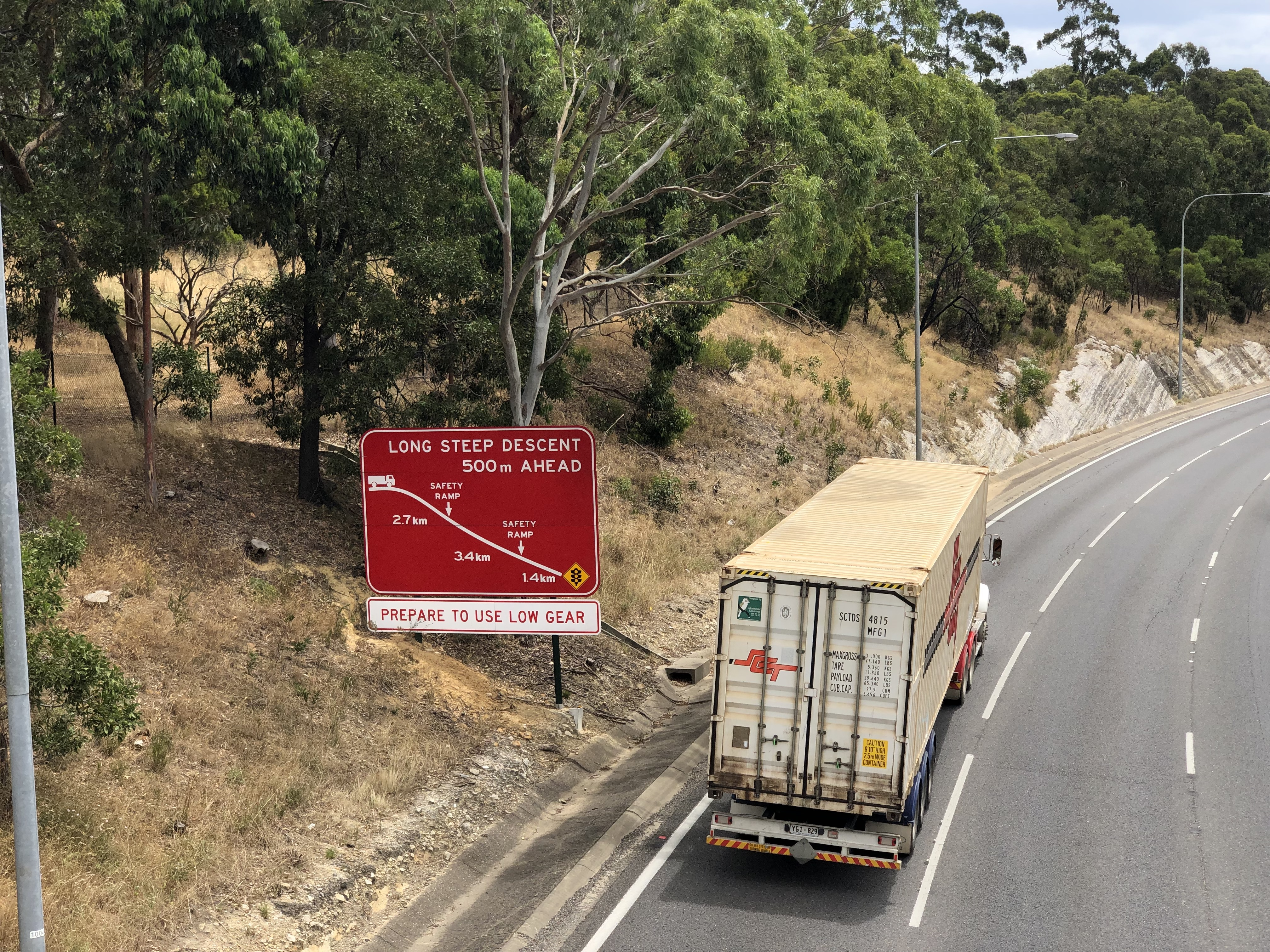 中文（香港）: 東南公路阿德萊德至嘉佛士段「長命斜」，中型拖車接連發生交通意外。當局設置路牌提示，並限制五軸或以上的車輛必須使用最左線行車，其車速不得超越時速六十公里。